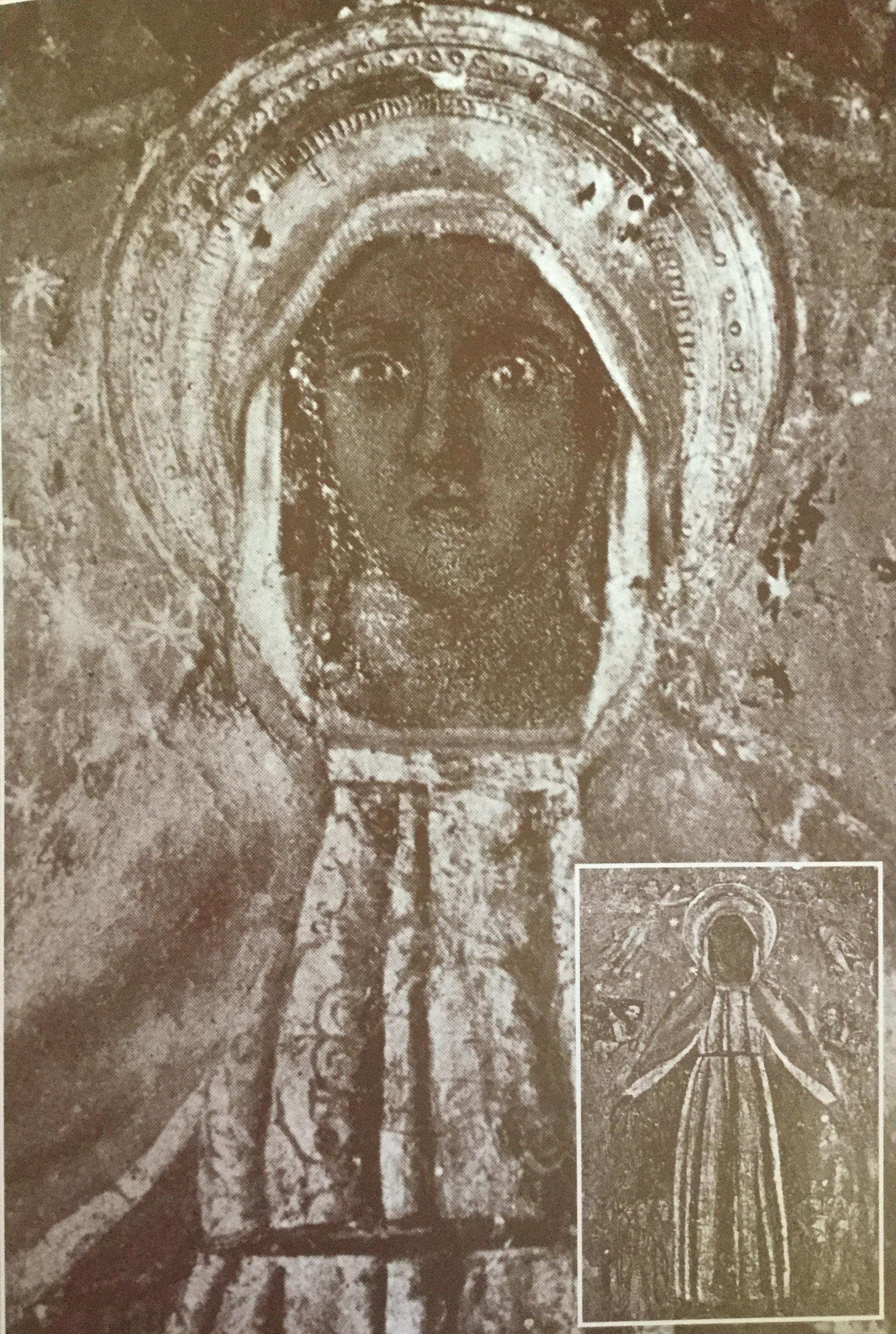 Antico affresco di autore ignoto distrutto nel secondo conflitto mondiale